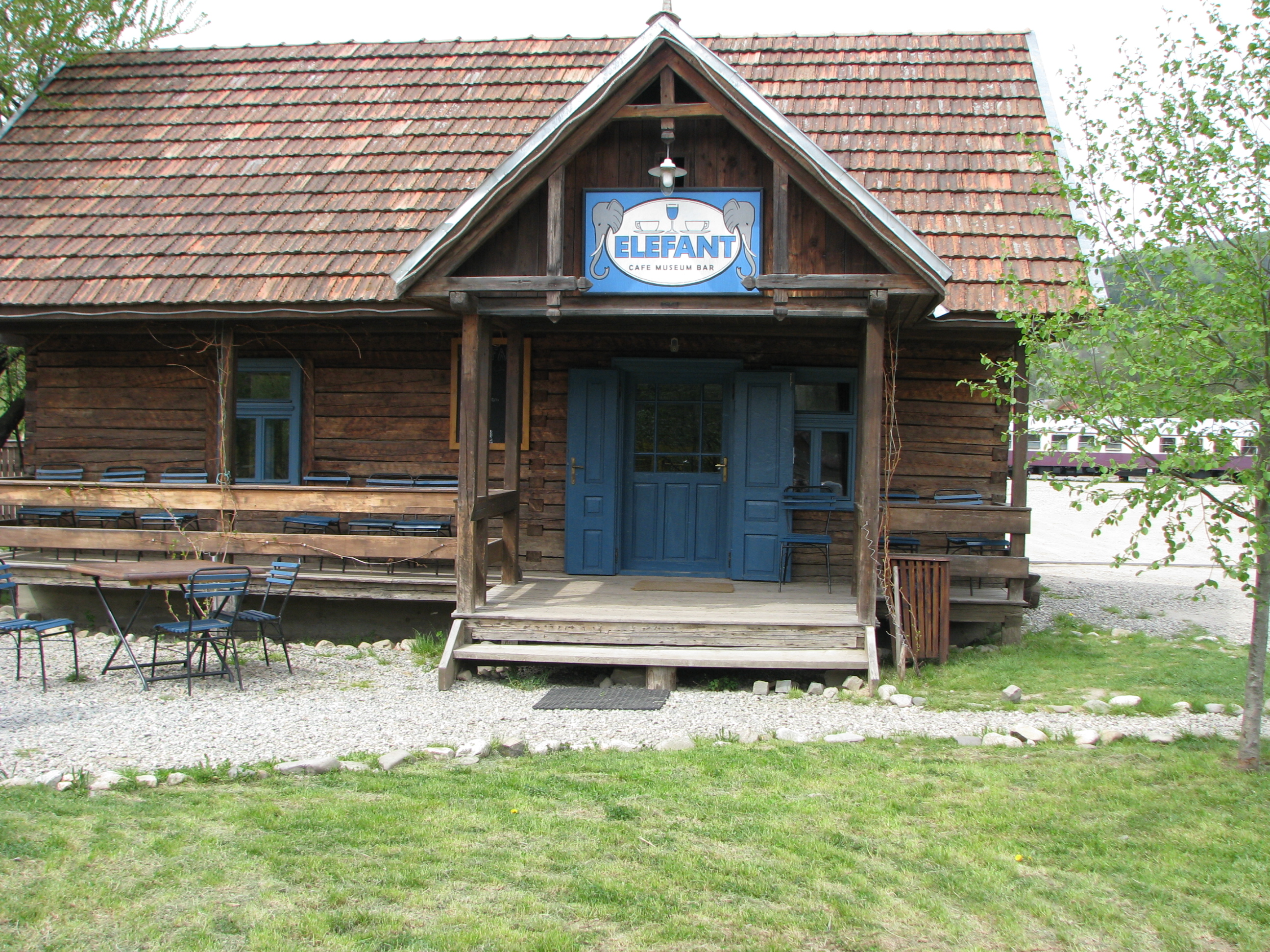 Casa elefant - Gara Vișeu de Sus 04